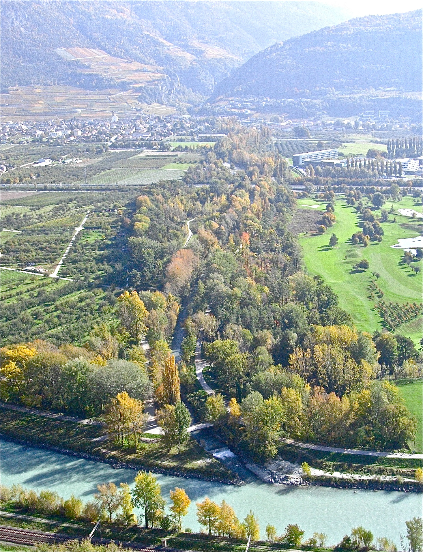 Embouchure de la borgne et val d'Hérens